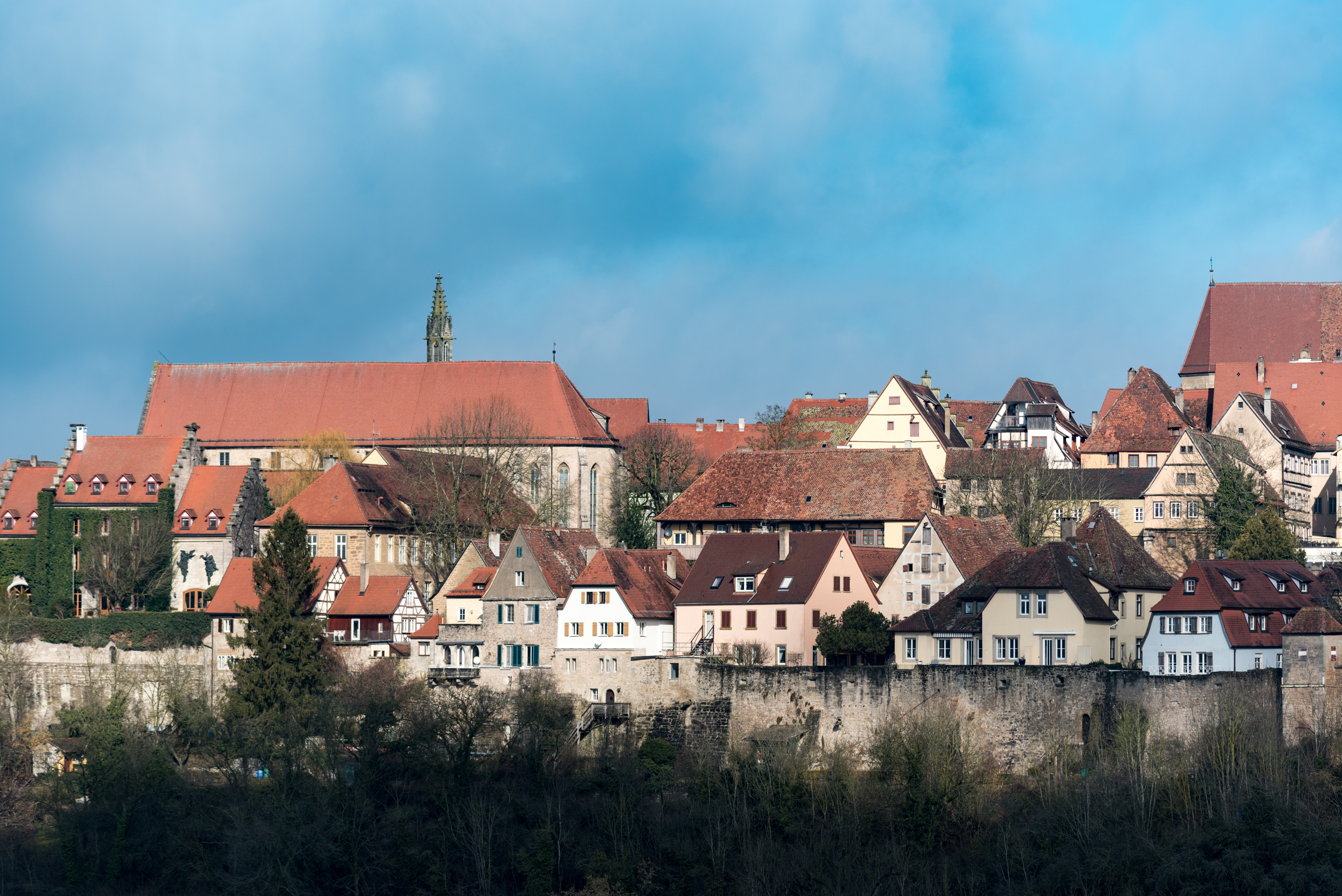 Rothenburg ob der Tauber, Burgweg Panorama vom Mühlacker